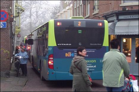 Bus van Maxx.